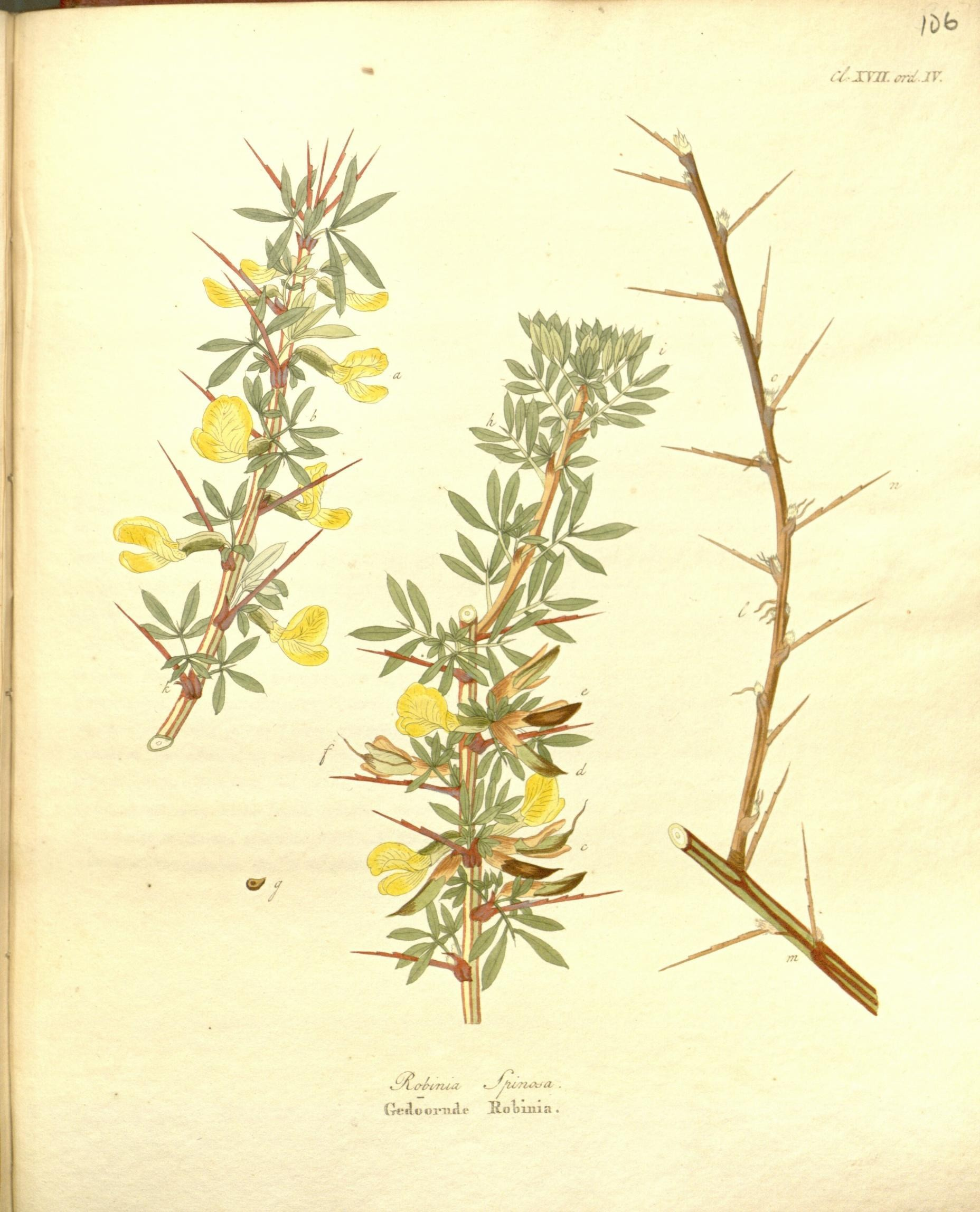 Cl. XVII ord. IV Robinia Spinosa. Gedoornde Robinia.